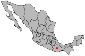 Location of Oaxaca de Juárez, Oaxaca, Mexico